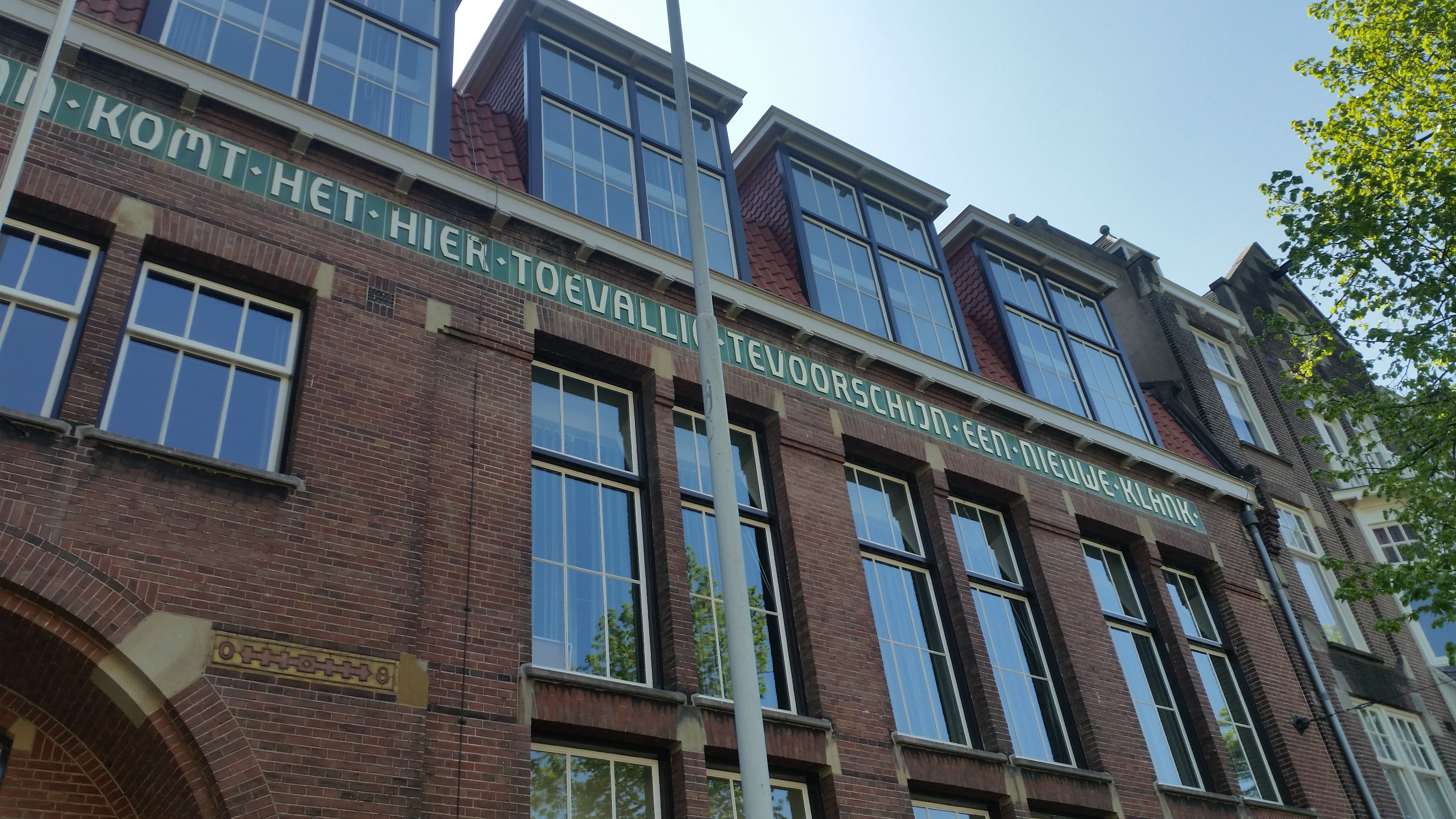 Impressie van Gabriël Metsustraat 16, Amsterdam